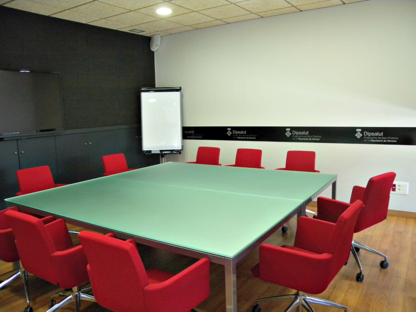 Sala del Consell Rector de la nova seu de Dipsalut